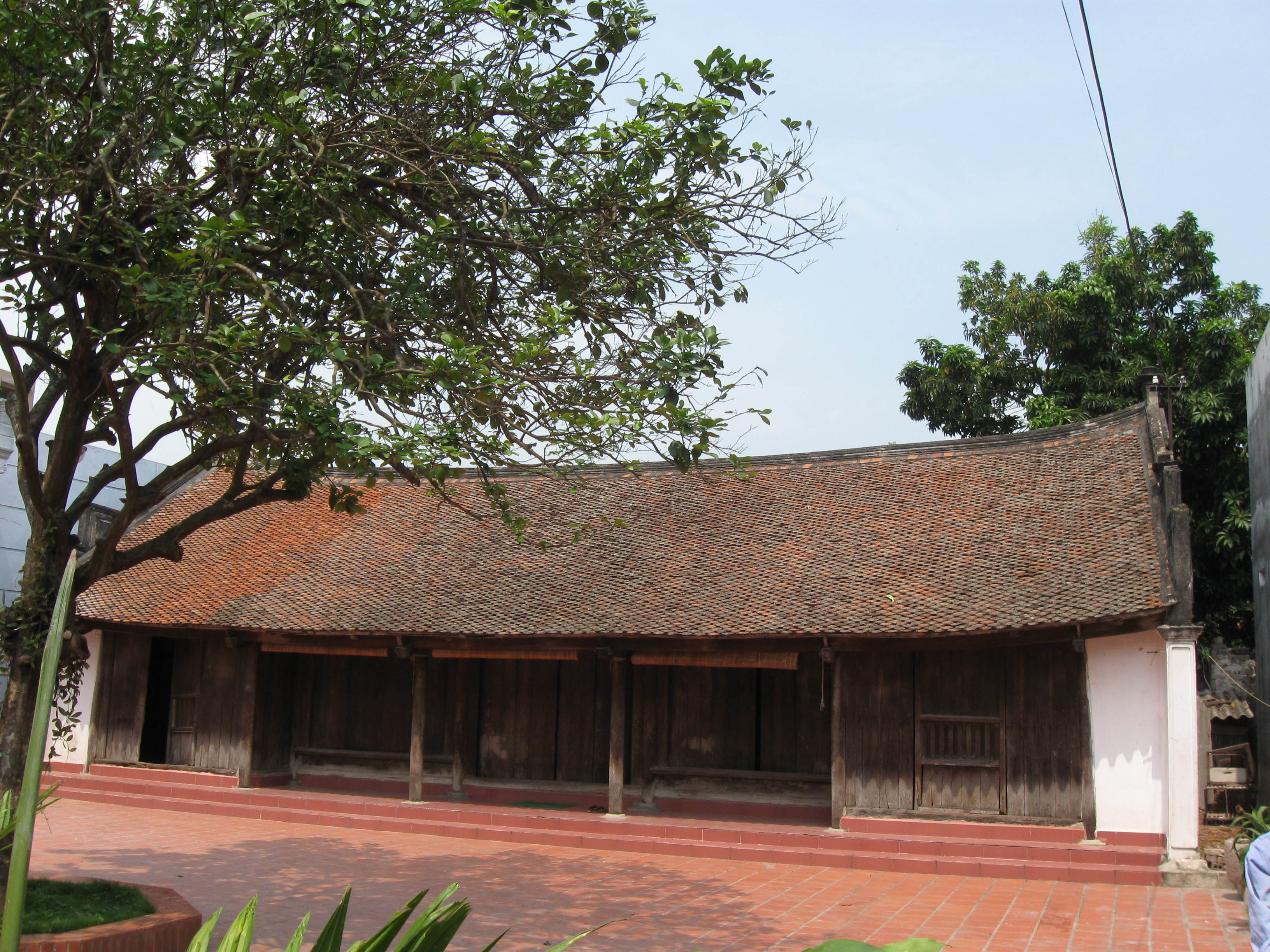 Nha co Nam Sach